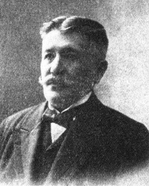 Österreichischer Politiker, Reichsratswahl 1907, Name siehe Dateiname